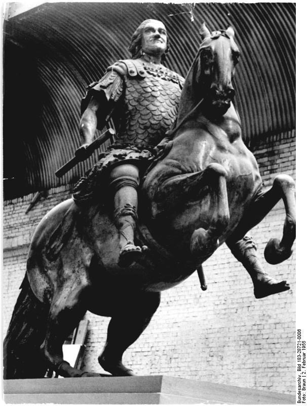 Dresden, "Goldener Reiter", Reiterstandbild August des Starken Zentralbild Braun 6 Motive 2.2.1955 Zum 10.Jahrestag der Zerstörung Dresdens am 13.2.1955 Der mörderische Angriff der anglo-amerikanischen Bombenflugzeuge am 13.2.1945 ließ die weltberühmte Kulturstadt Dresden in Schutt und Asche sinken. Dresden entsteht neu, modern, aber in alter architektonischer Schönheit. UBz: Dieser goldene Reiter, der einst auf dem Neustädter Markt stand, soll demnächst wieder aufgestellt werden. Nach seiner Restaurierung hat er bisher seinen Platz im Albertinum gefunden.